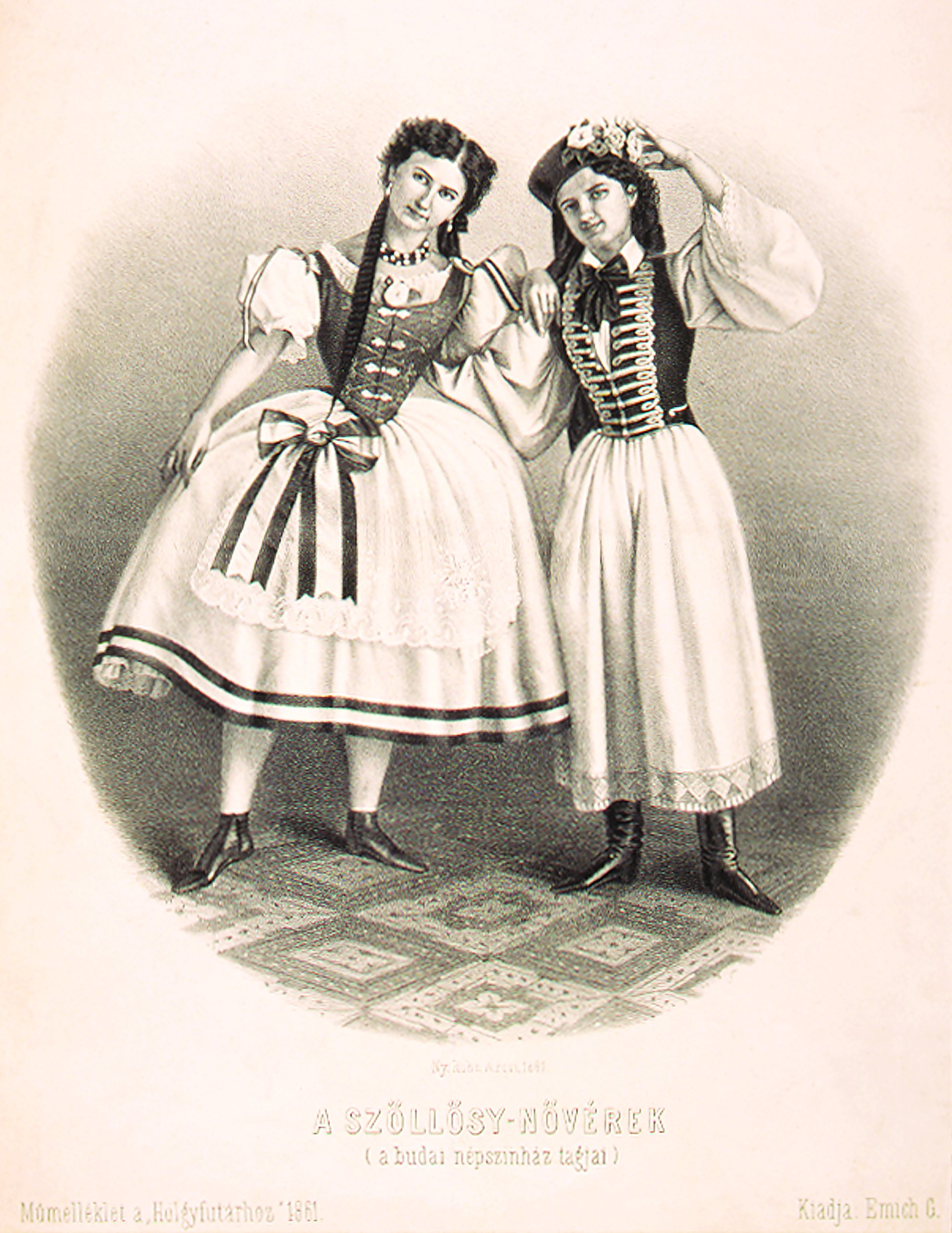 Szöllősy Róza és Szöllősy Piroska szerepképe Szöllősy Szabó Lajos Vasmegyei csárdás című táncjelenetében